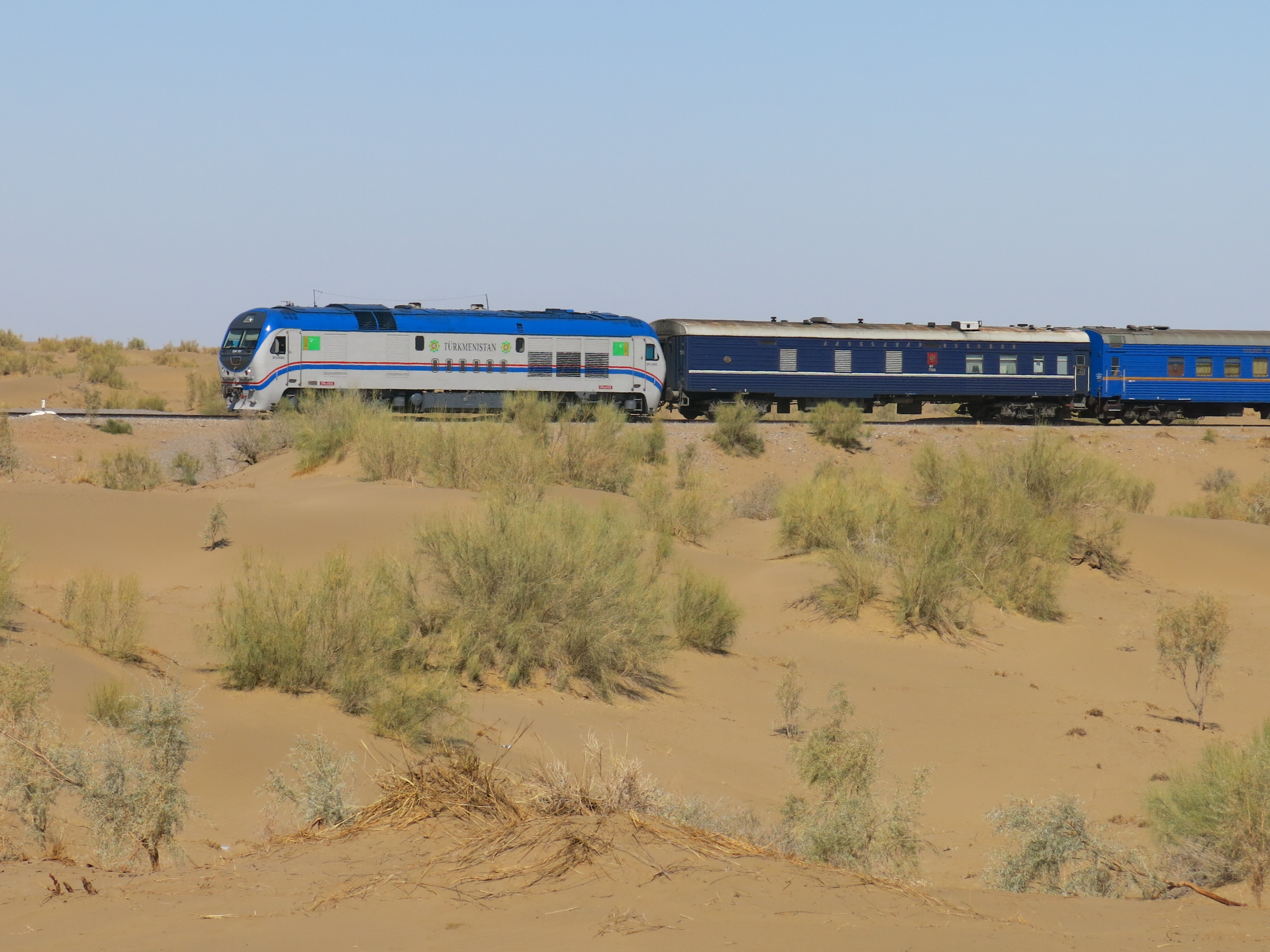 Expresszug auf der Karakum-Transversale Daşoguz - Aşgabat unterwegs zwischen den Oasen Yerbent und Bokurdok